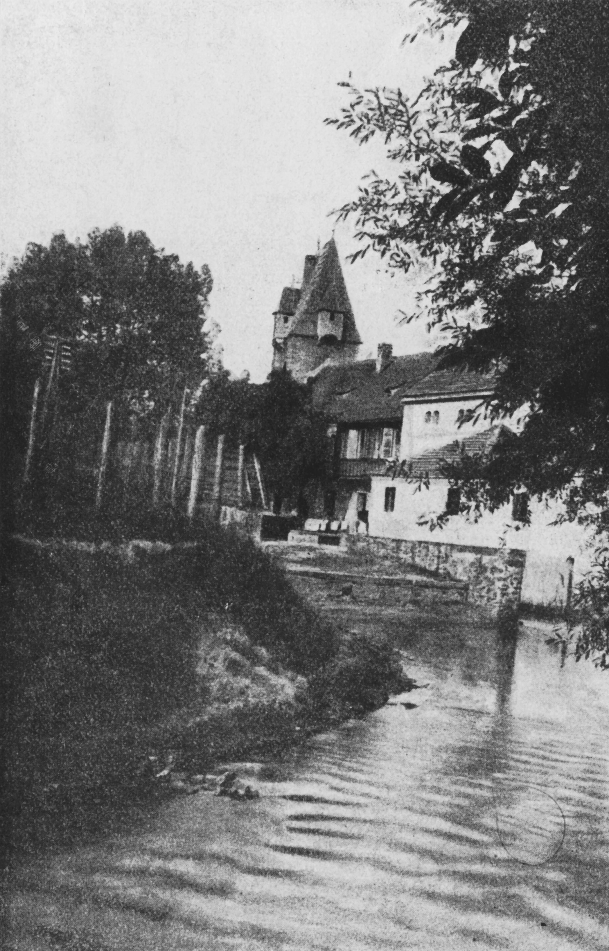 Album starých Budějovic. Rabštejnská věž, Zadní mlýn, Vltava. (orig. text: Hradební věž „rabenštejnská“ u Zadního mlýna, od vtoku Mlýnské stoky do Vltavy.)